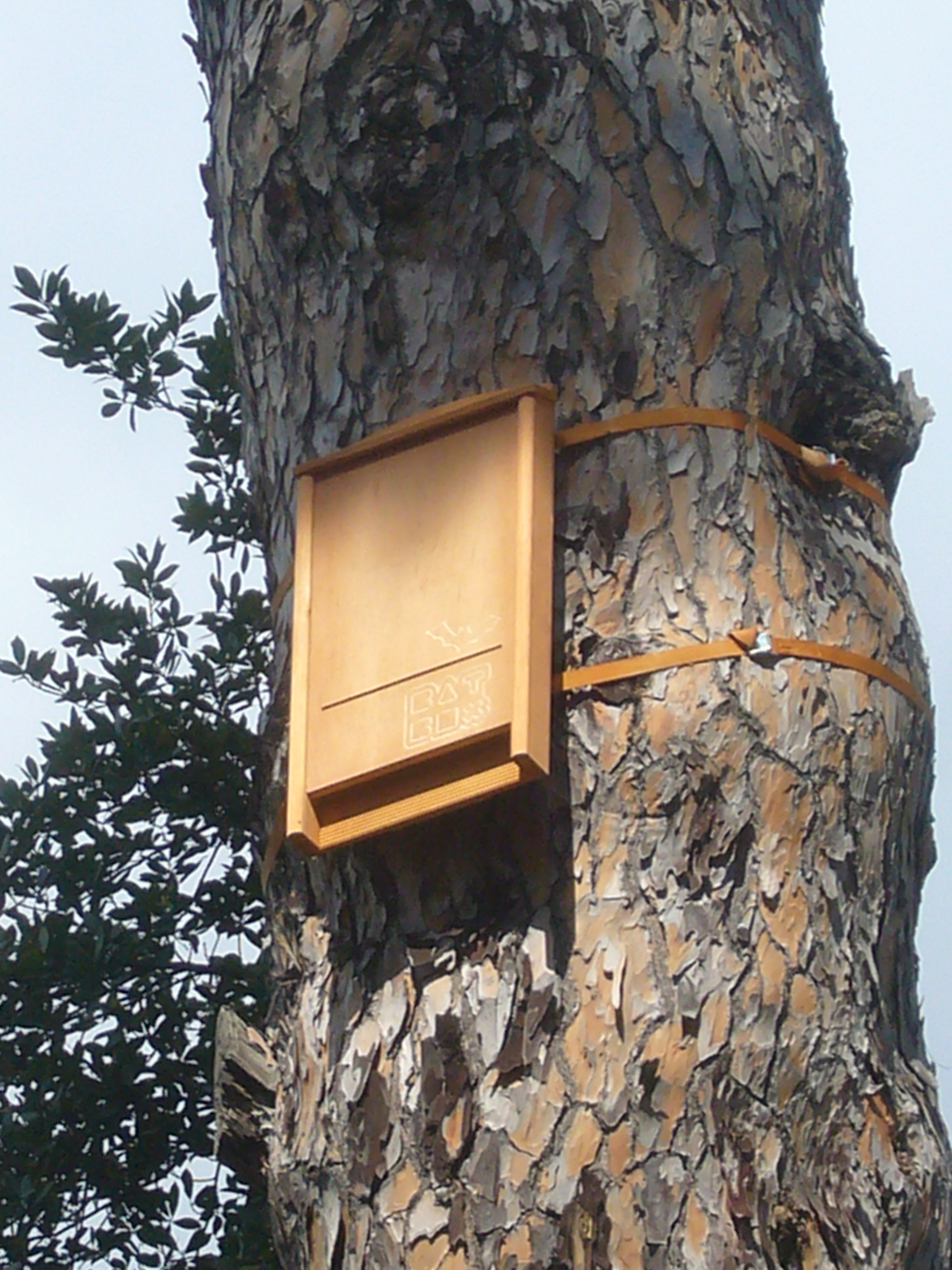 Roma, Villa Ada: casetta da pipistrelli su un pino